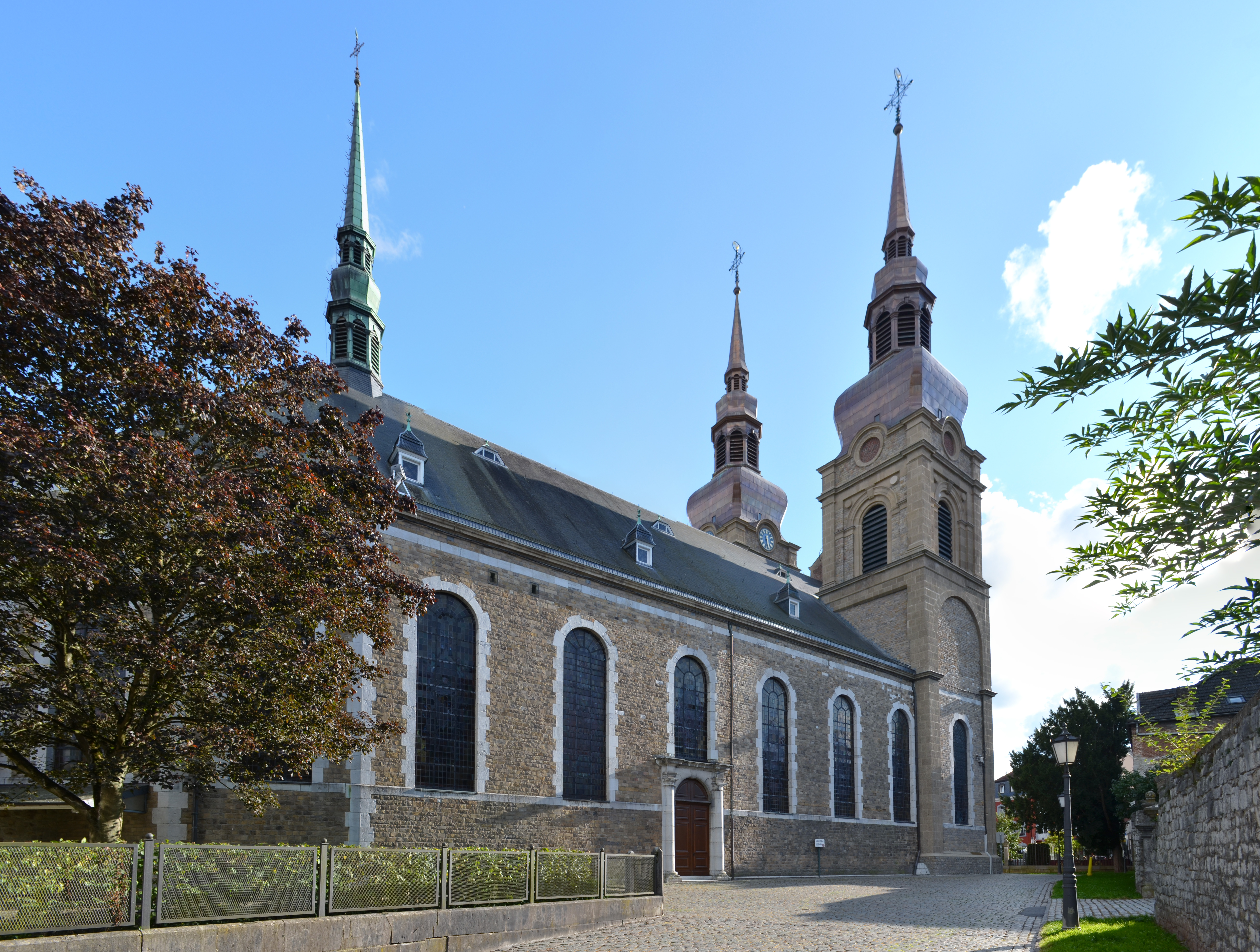 St.-Nikolaus-Kirche in Eupen This image was created with Hugin.